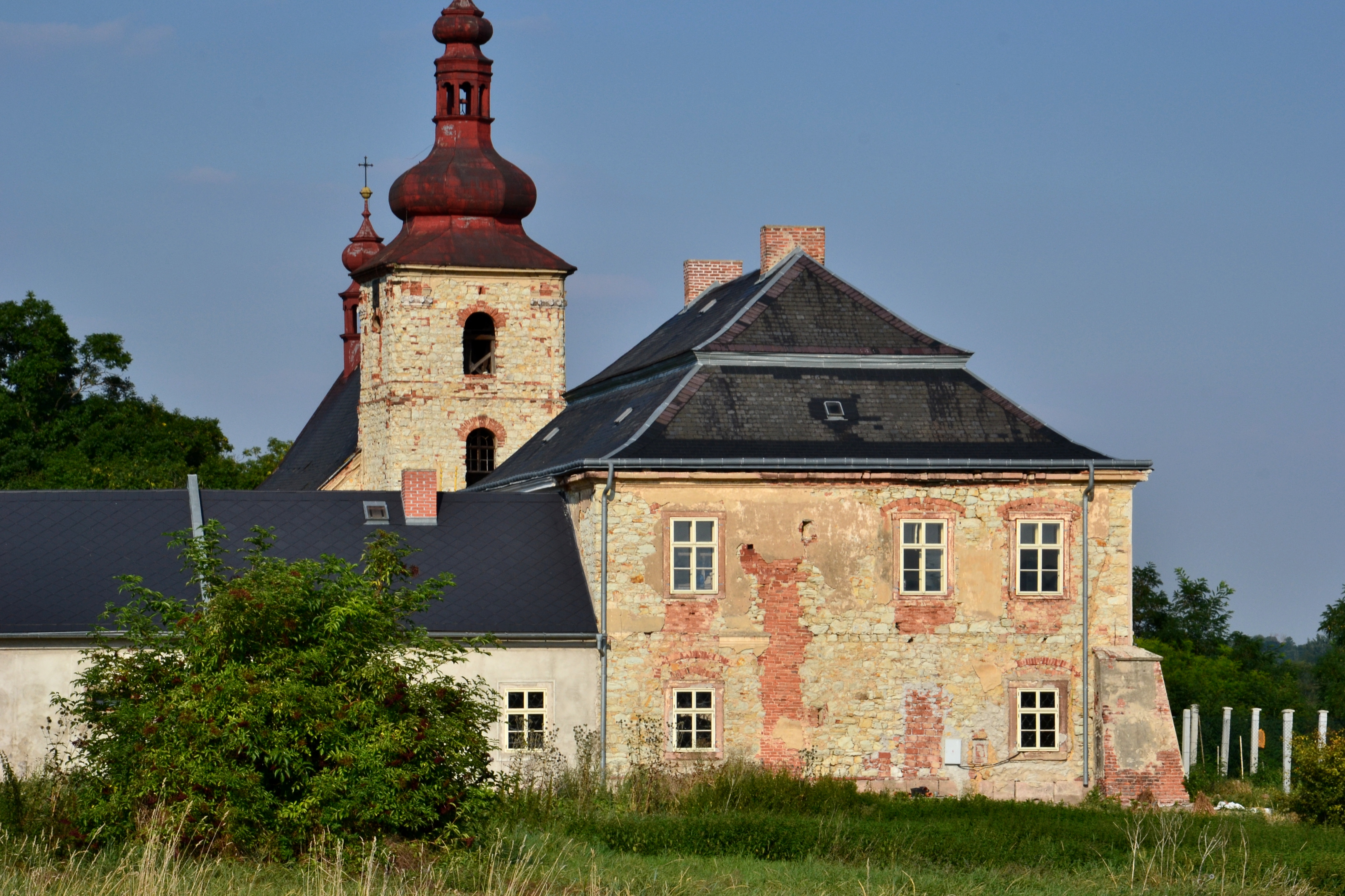 Fara (Žabokliky 1) a kostel v Žaboklikách.